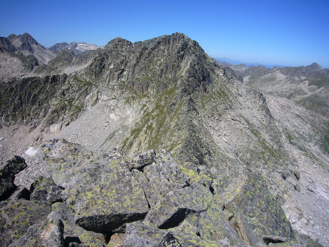 Pic Oriental vis des de l'est, la Vall de Boí, Alta Ribagorça, Catalunya